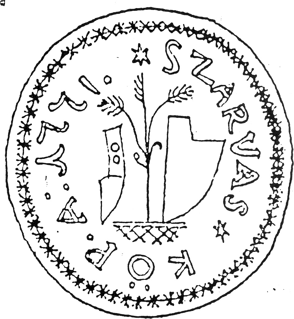 Szarvaskő község 1771-ből származó pecsétlenyomata.